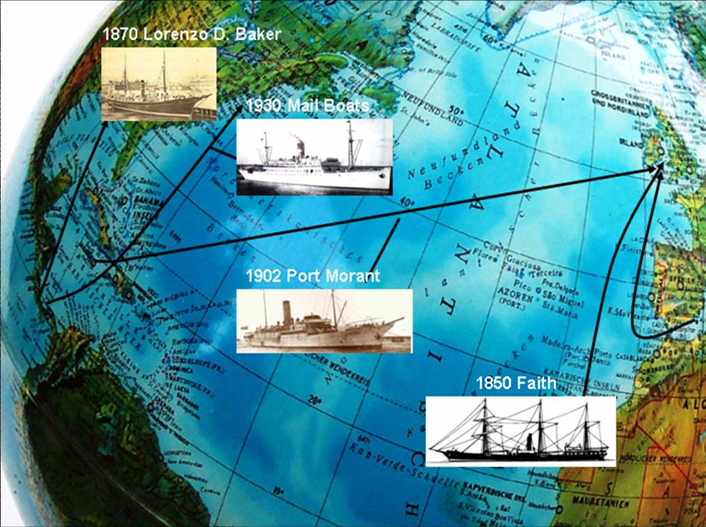 Entwicklung des Bananentransportes über See